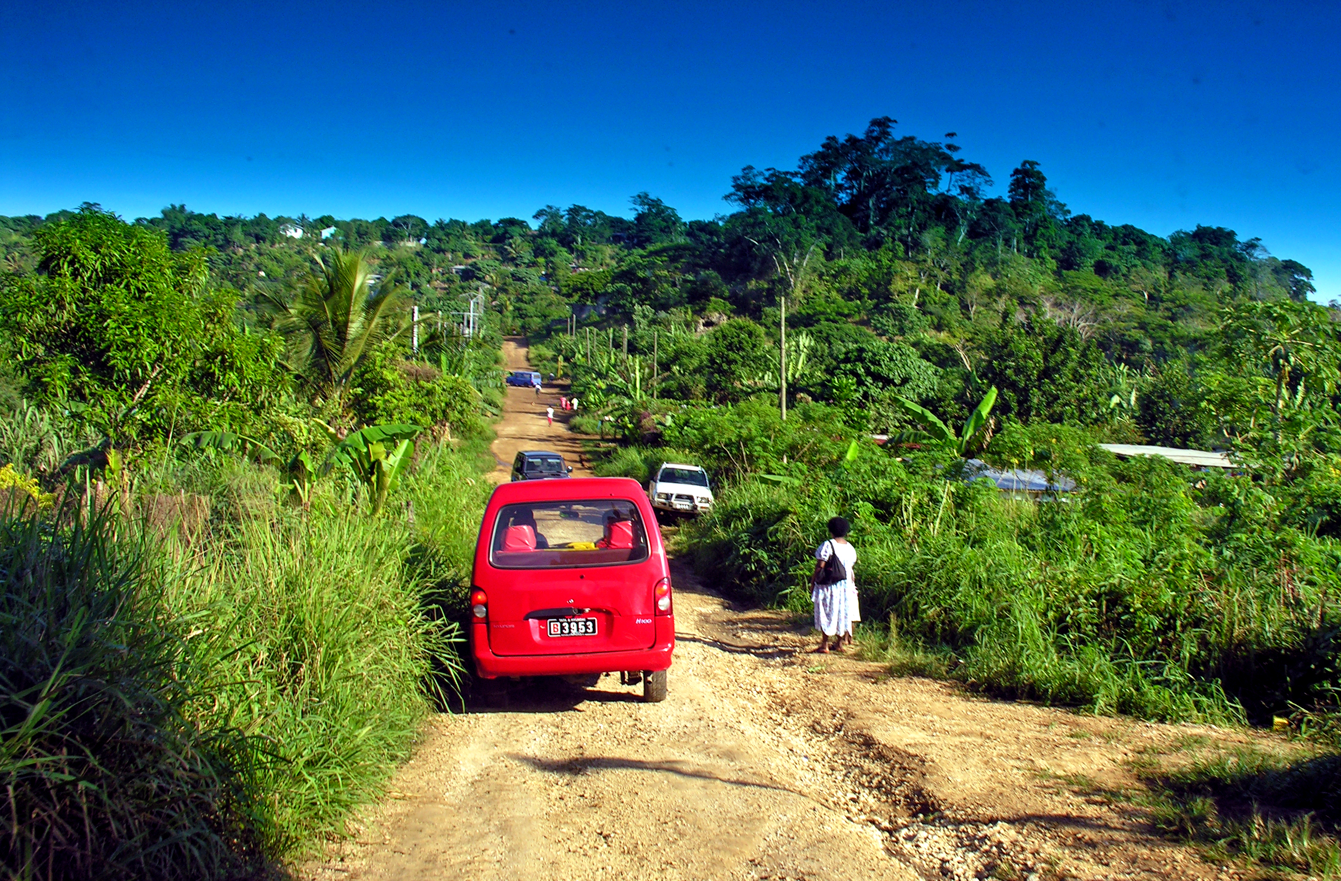 Suburban Port Vila bus, Vanuatu